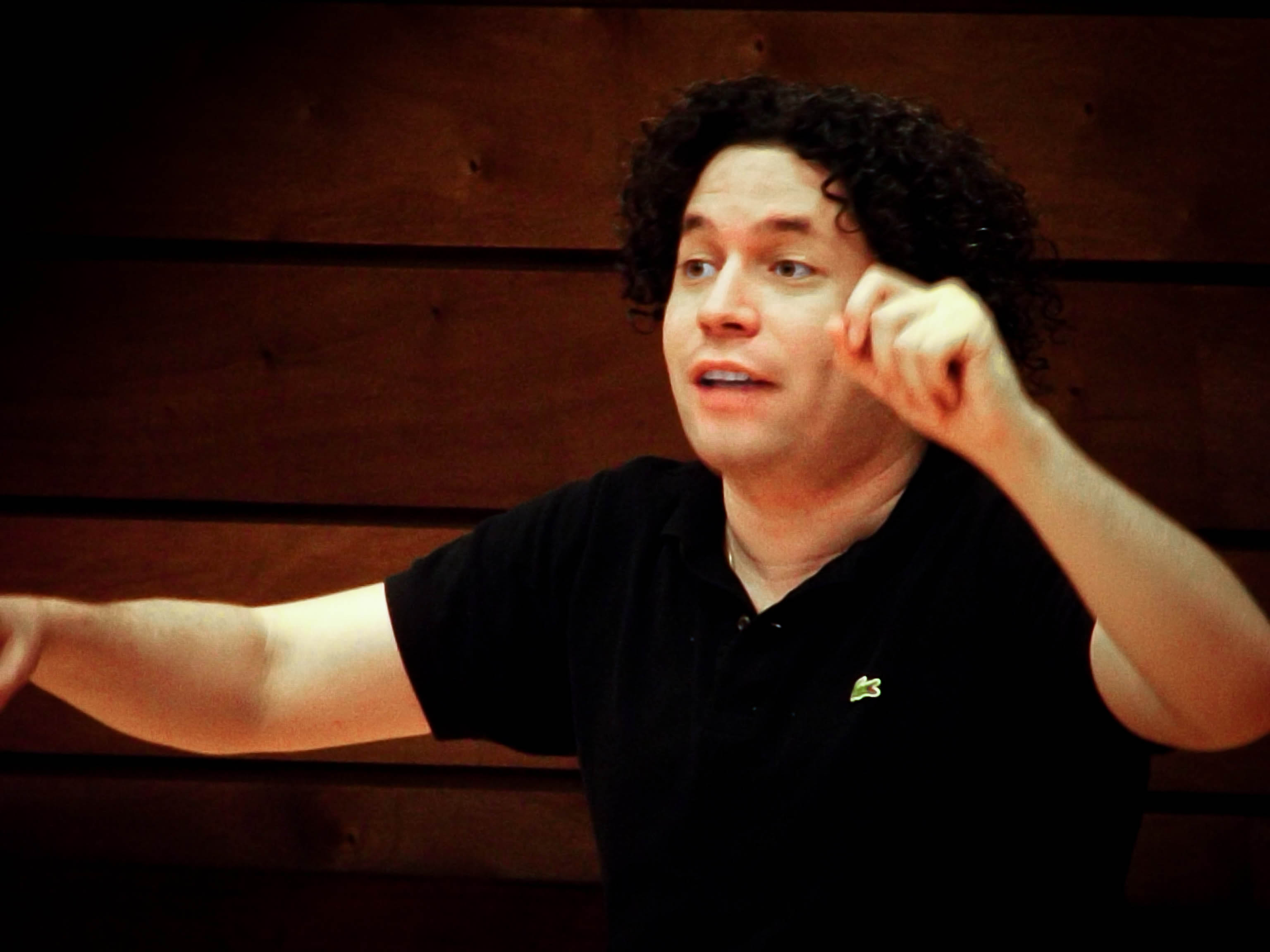 Ensayo para la 8va sinfonía de Mahler